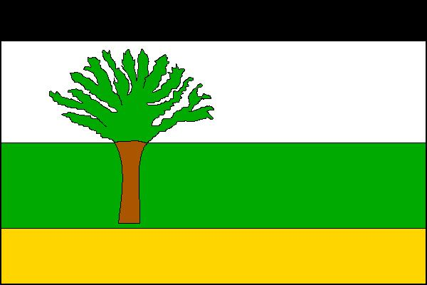 Vlajka obce Obora v okrese Blansko